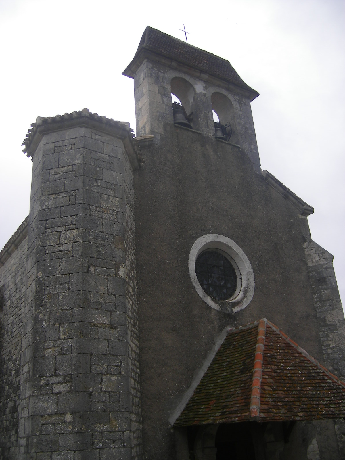 Villesèque